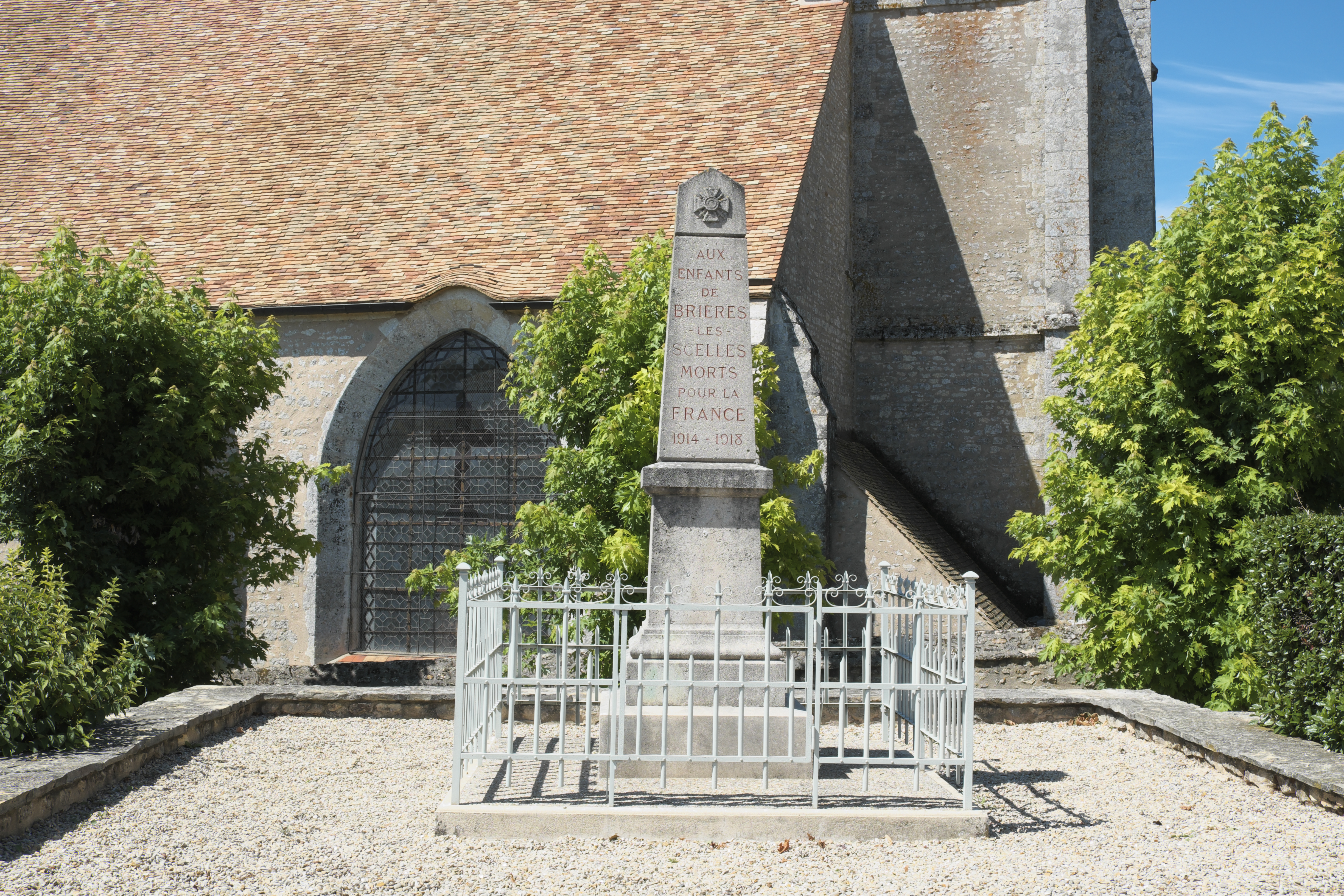 Kriegerdenkmal vor der katholischen Pfarrkirche Saint-Quentin in Brières-les-Scellés im Département Essonne (Île-de-France/Frankreich)